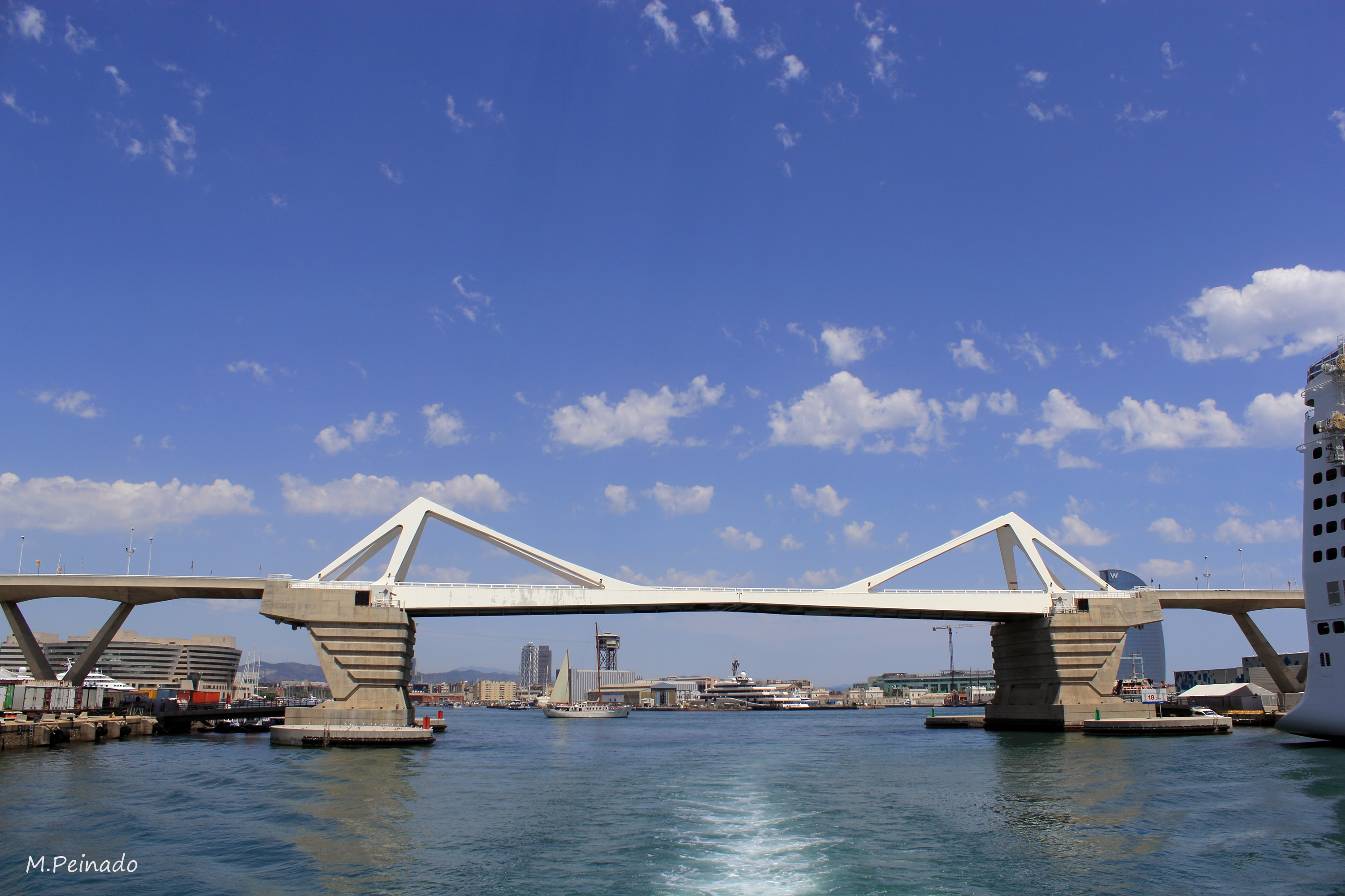 Puente Levadizo Puerta de Europa Puerto de Barcelona. Tomada desde el barco turístico "Las Golondrinas" Barcelona Provincia de Barcelona Cataluña España